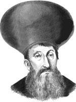 Costache Conachi, Gran Canciller.